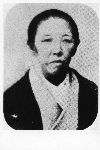 Portrait von Nakajima Utako